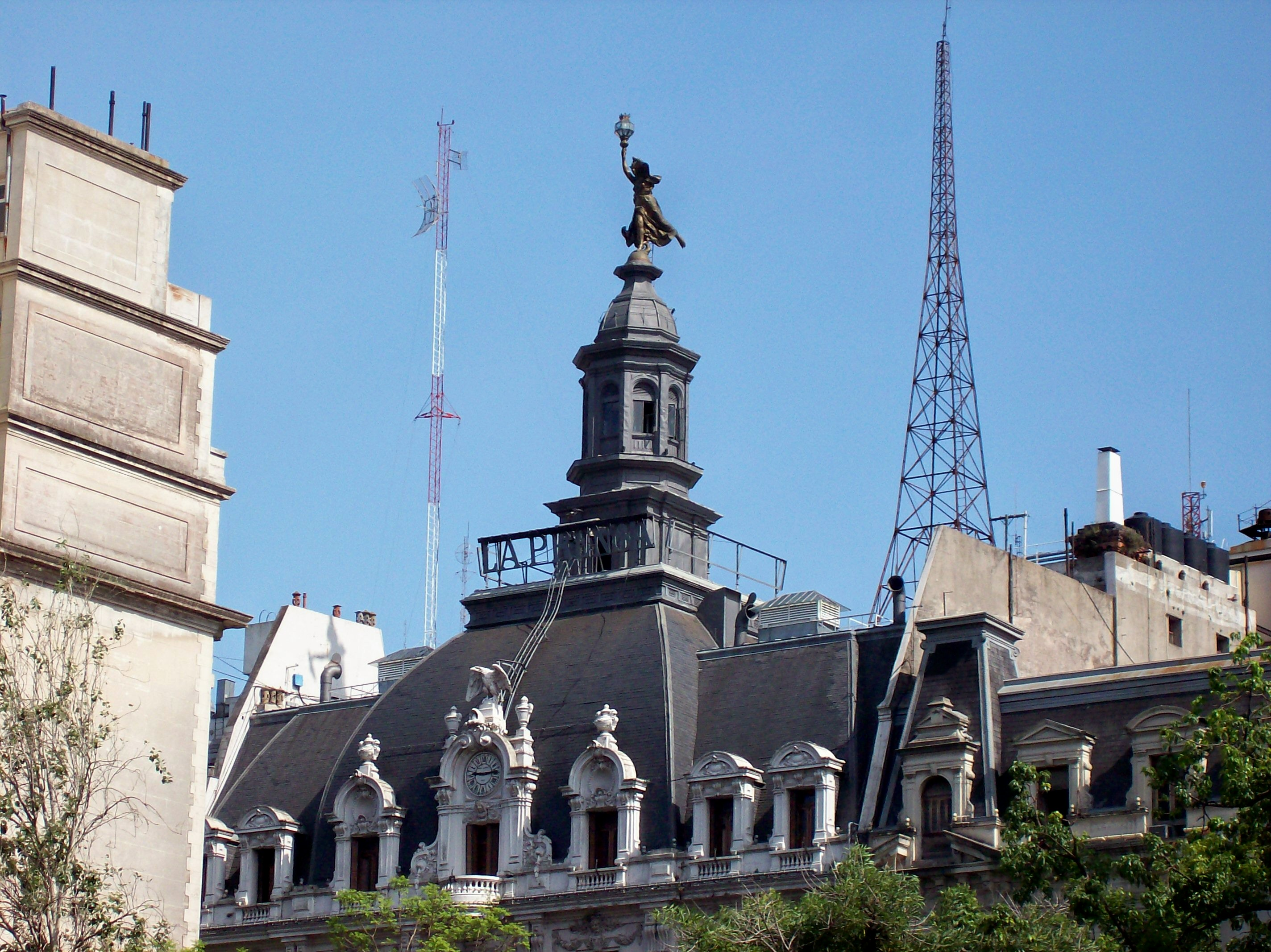 Estatua del edificio "La Prensa", en Avenida de Mayo, Buenos Aires